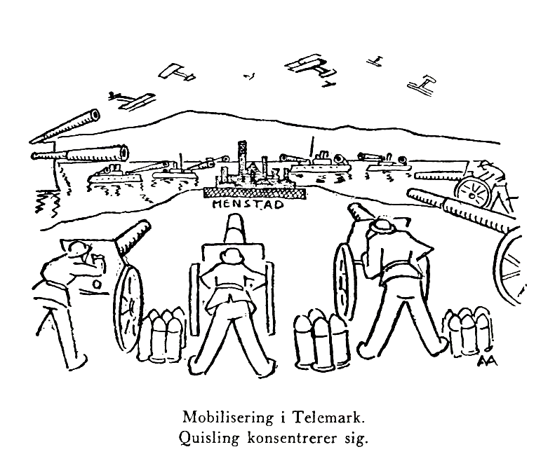 Fra Arbeiderbladet, 10. juni 1931.